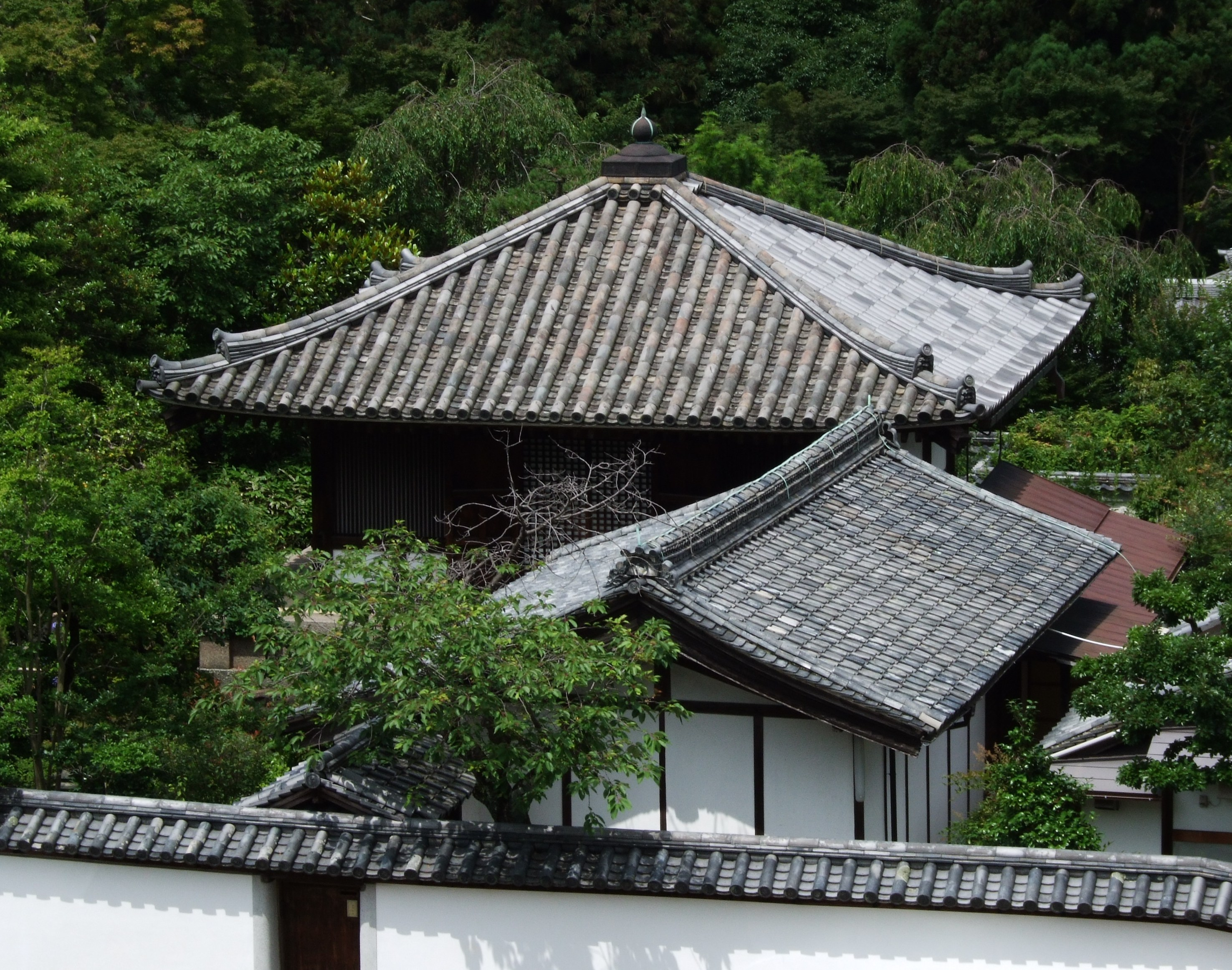 ２００８年７月 ｈｉｒｏ撮影 東大寺(奈良市) 東大寺 日本の寺院一覧 とうだいじ とうだいじ とうだいじ